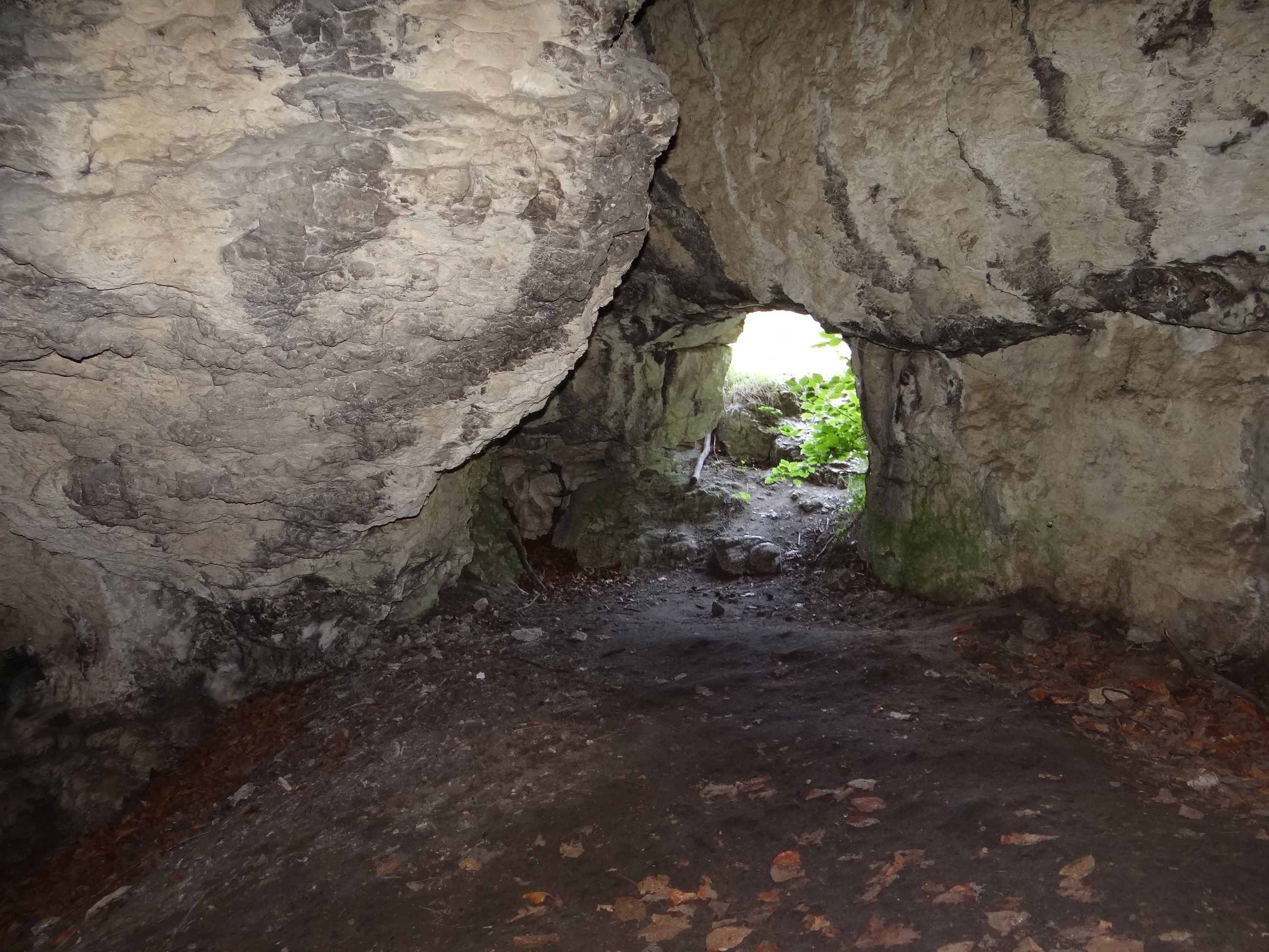 Jaskinia w Straszykowej